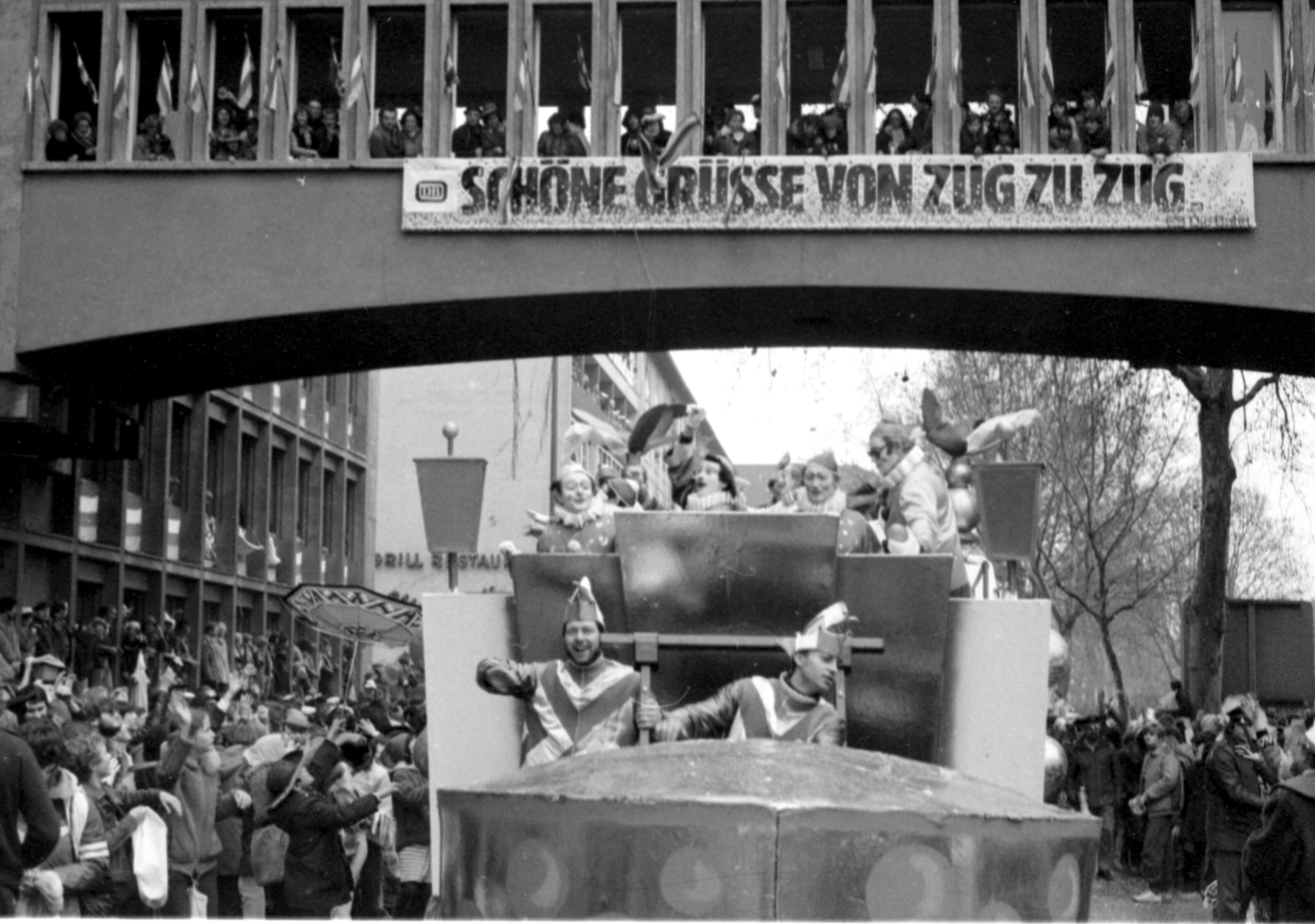 Mainzer Rosenmontagsumzug 1981 am 2. März 1981